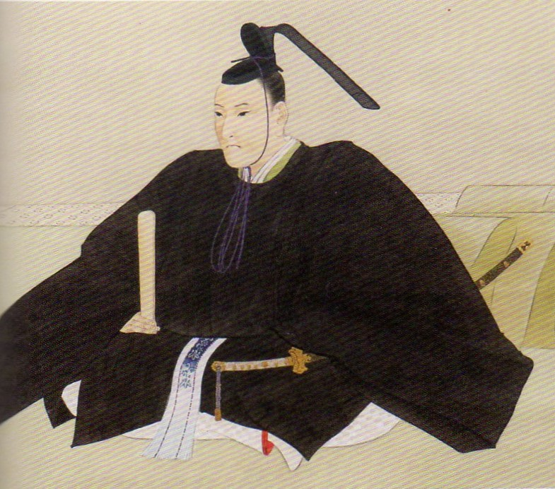 小笠原忠徴の肖像(モノクロ)。